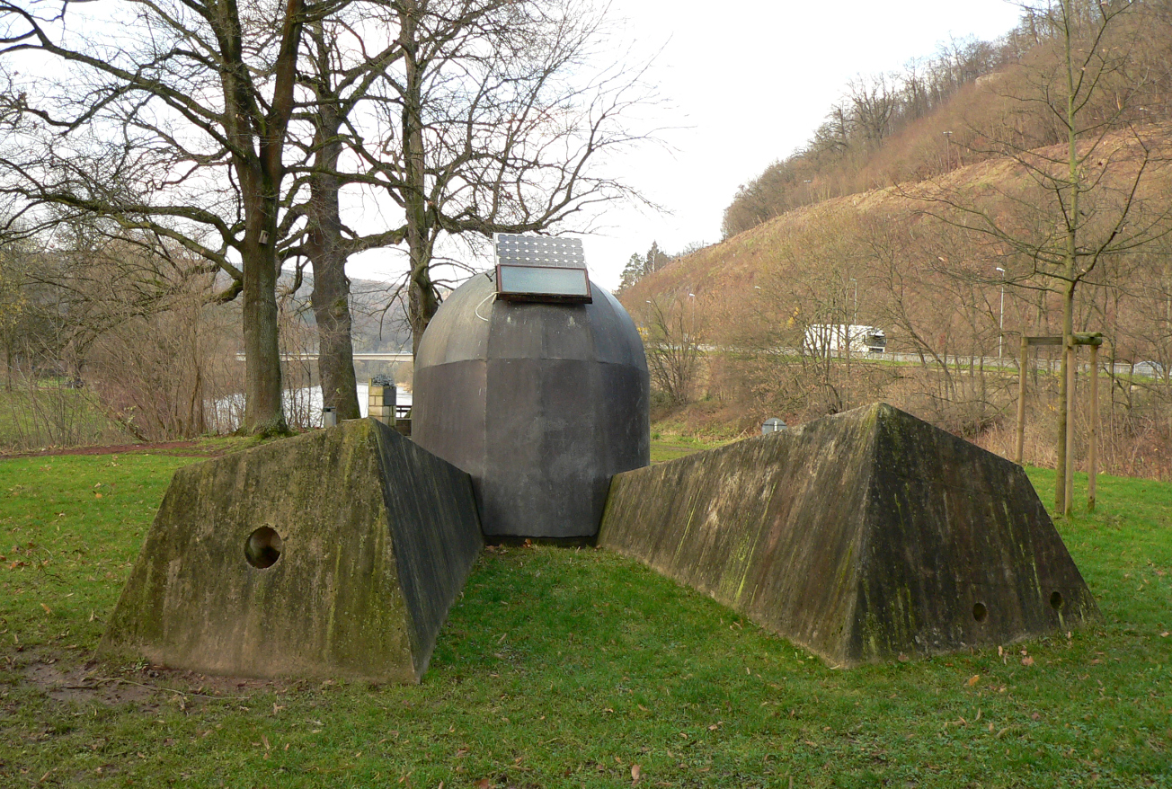 3 Räume - 3 Flüsse von ManfreDu Schu auf dem Doktorwerder in Hann. Münden, im Hintergrund die Weser am Zusammenfluss von Werra und Fulda